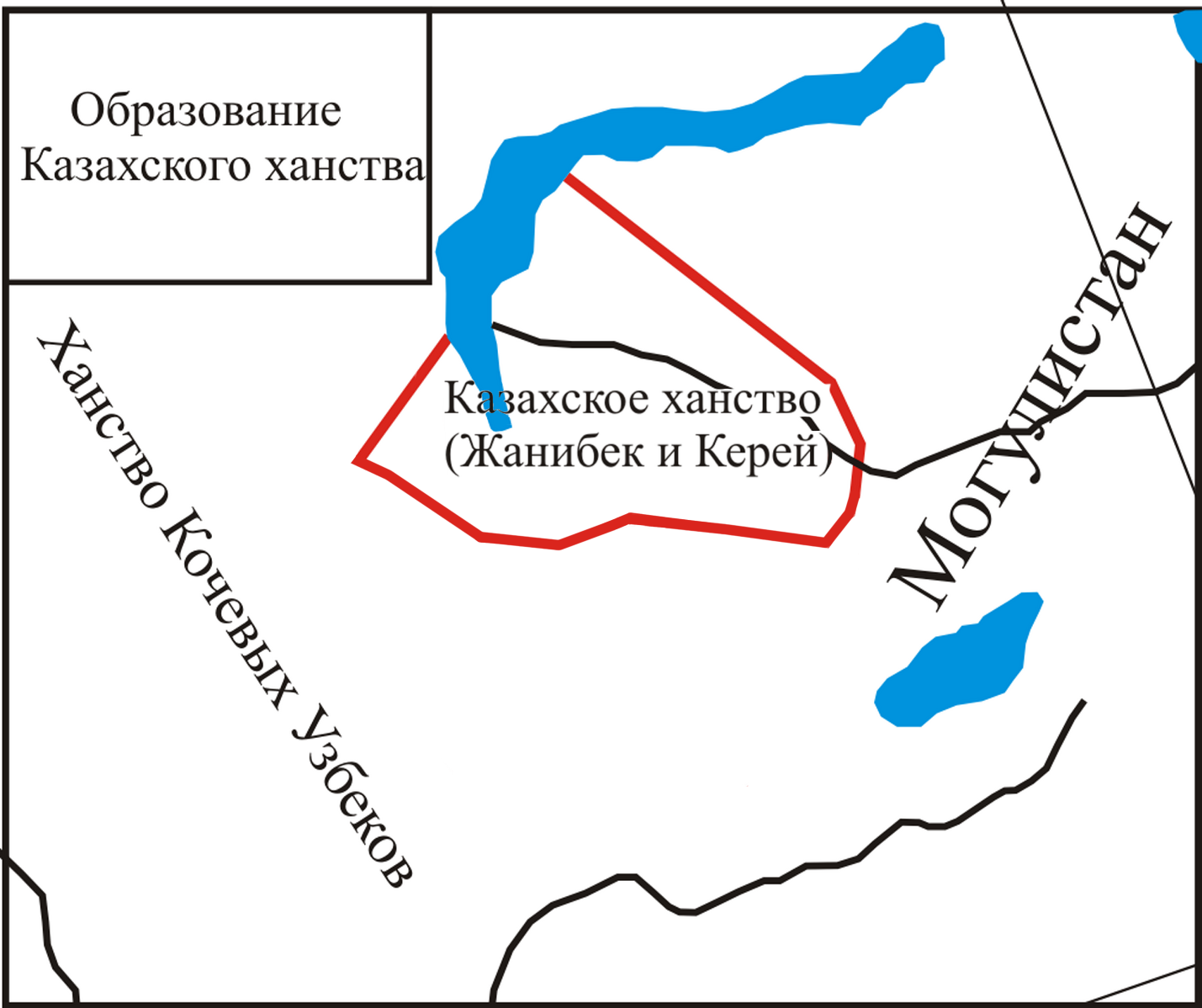 Карта образовании Казахского ханство